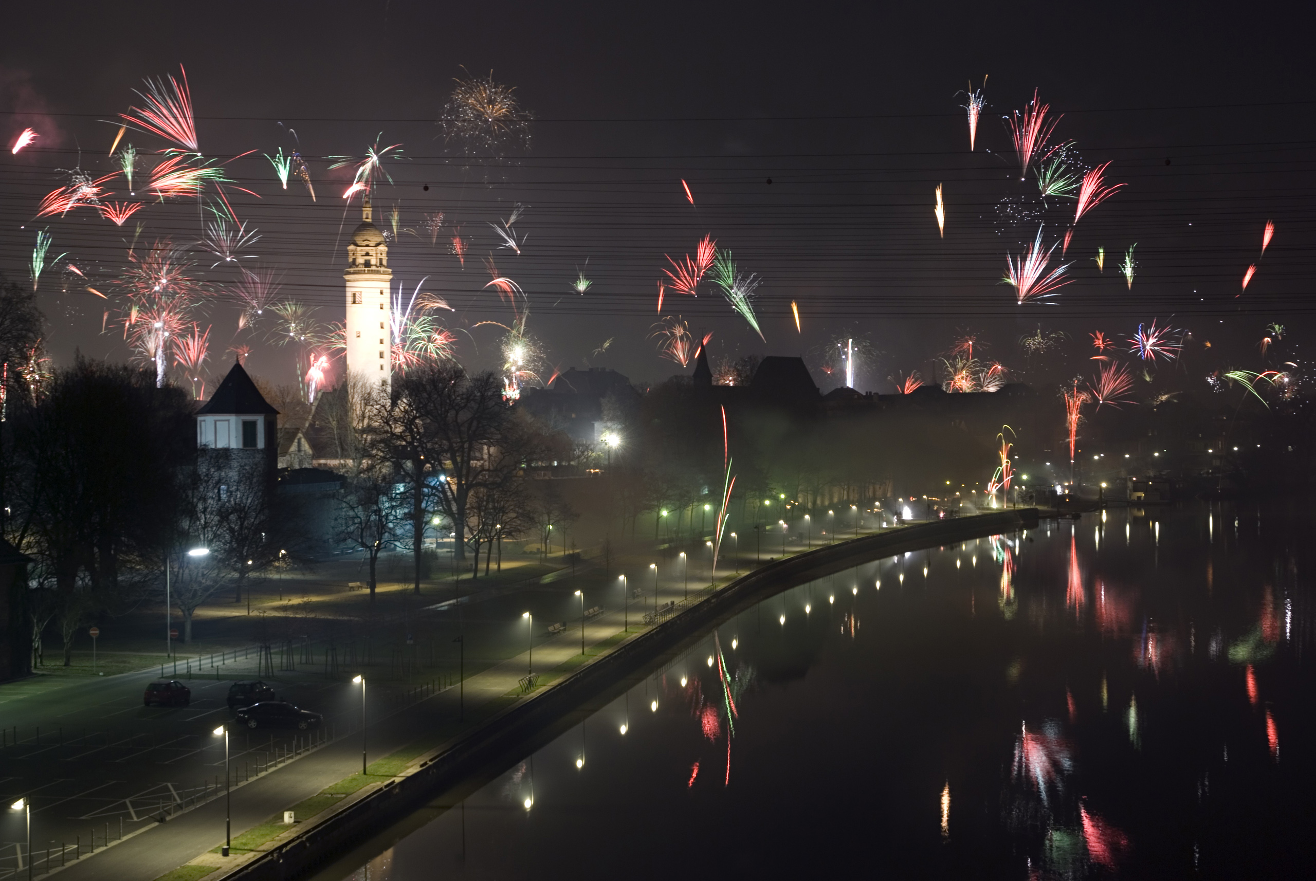 Feuerwerk 2009 in Höchst